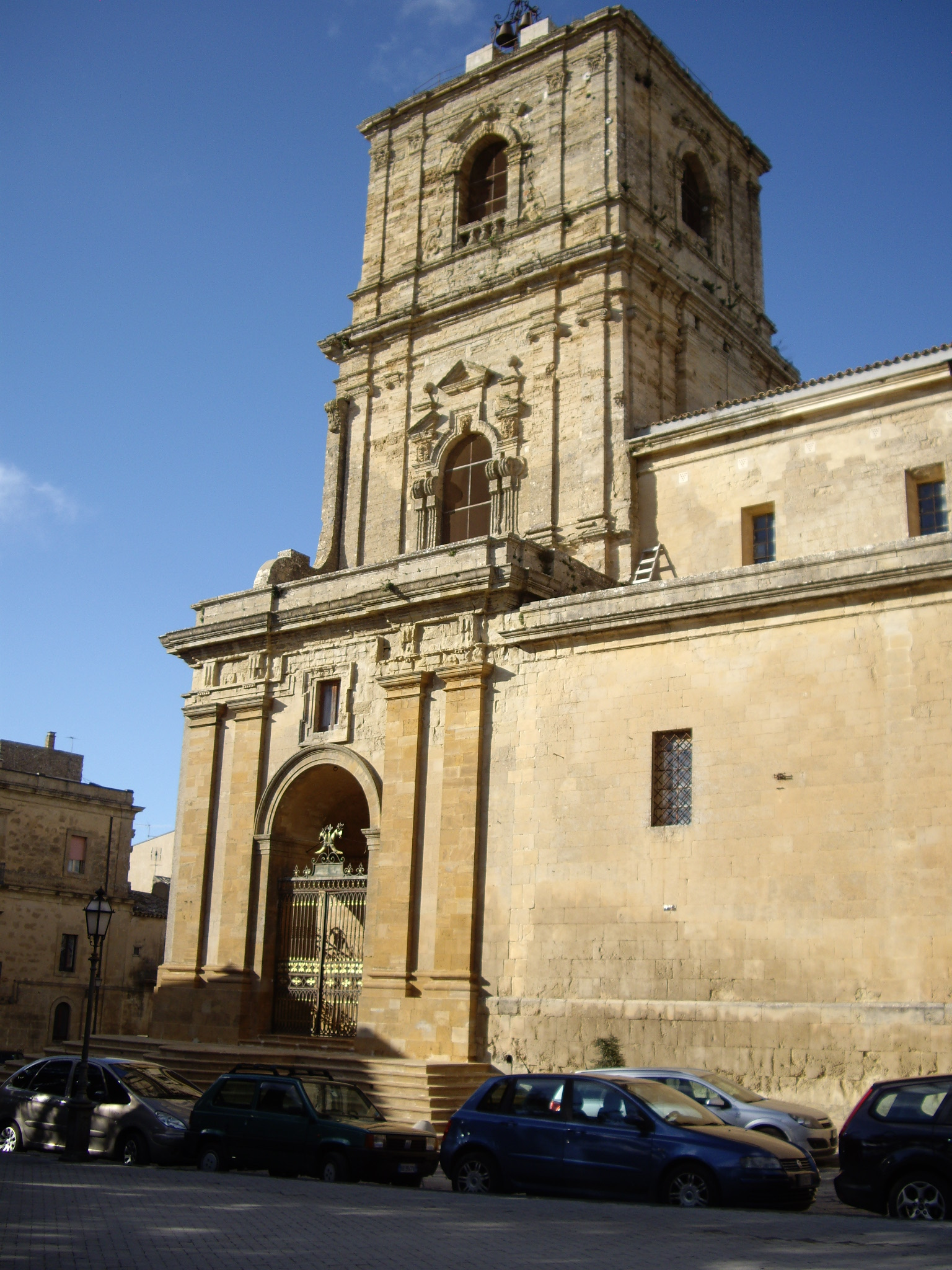 Ennako katedralaren alboa